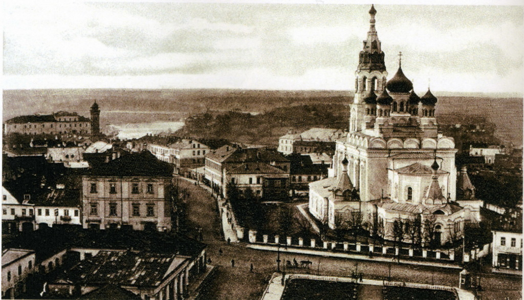 Беларуская (тарашкевіца): Від на вуліцу Замкавую